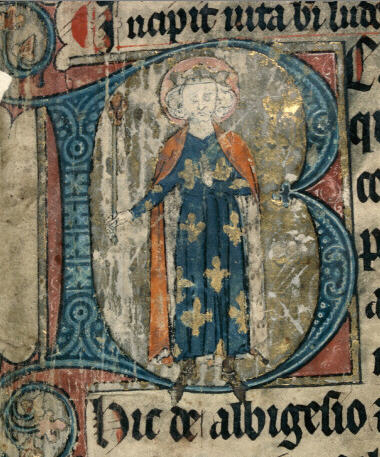 svatý Ludvík